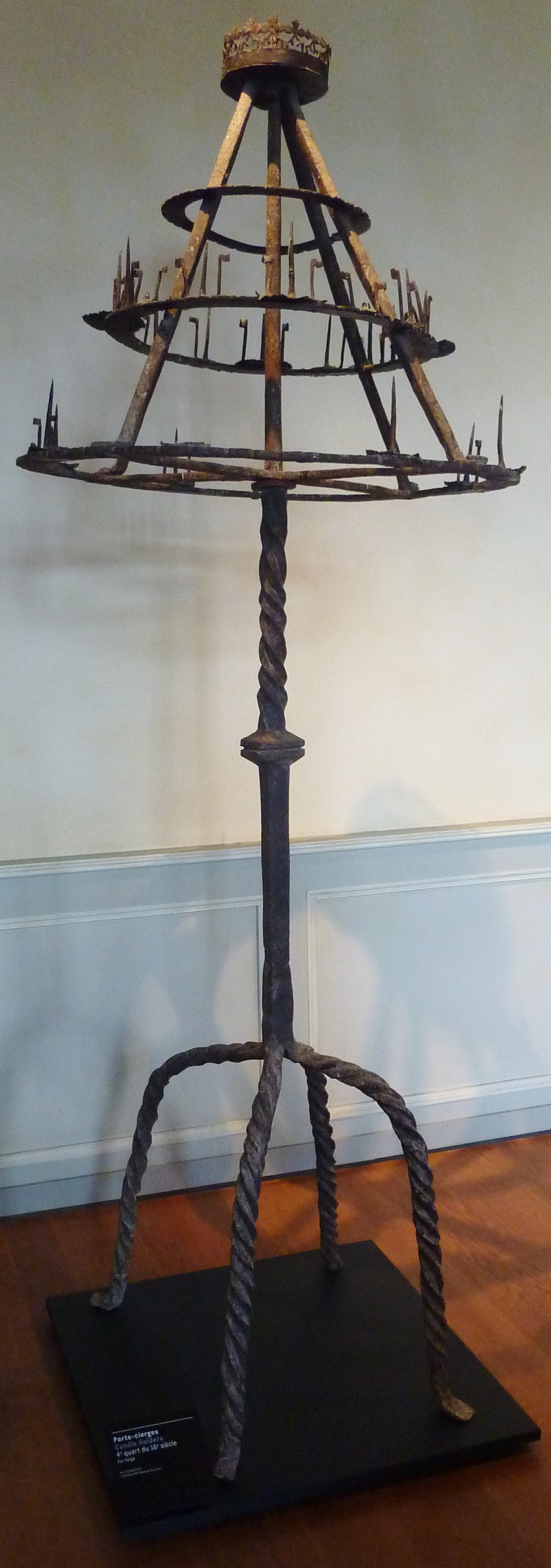 Plonévez-du-Faou : porte-cierges en fer forgé (4ème quart du XVIe siècle). Classé monument historique en 2000)